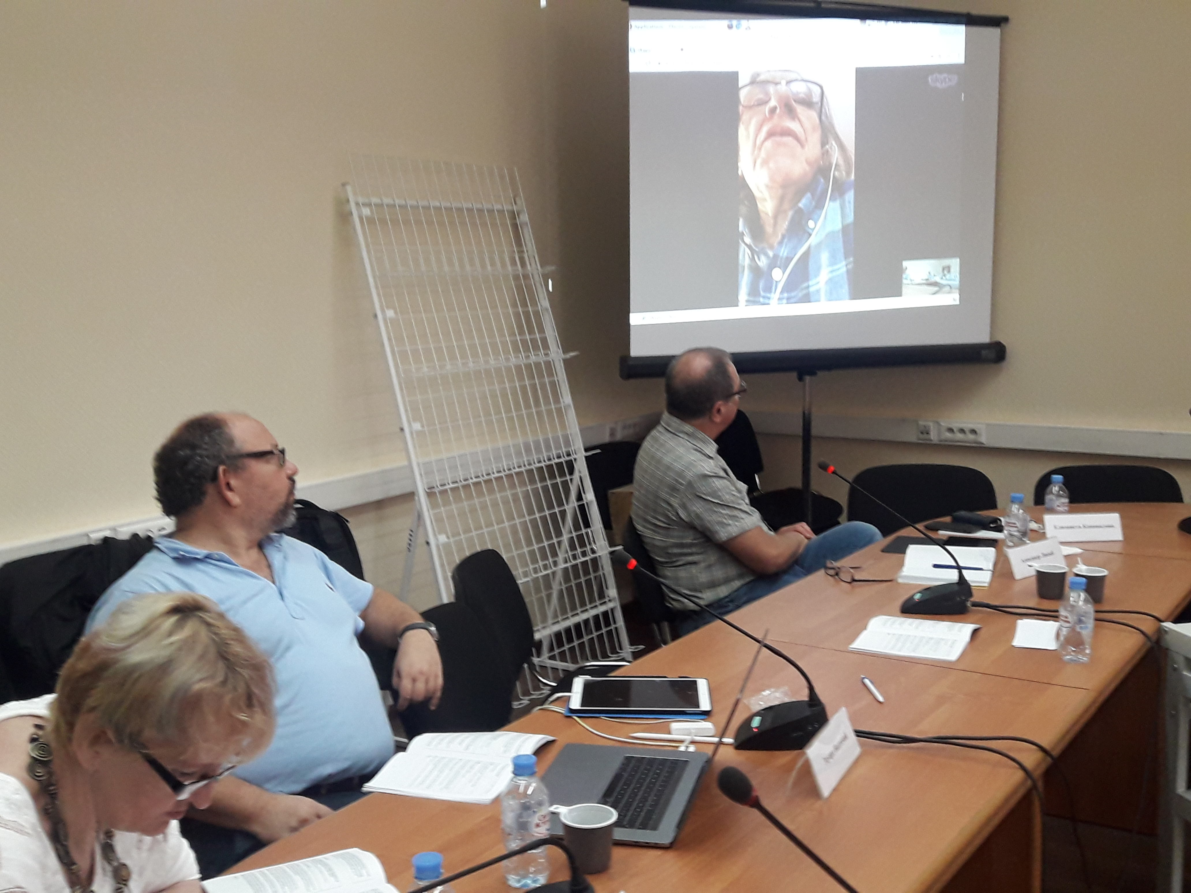 Я.Пробштейн выступает дистантно с докладом на 3-й Международной конференции по геопоэтике в Институте философии РАН. Сидят, слева направо: Мария Надъярных, Эдуард Надточий, Александр Люсый. Москва, 19.05.2018.